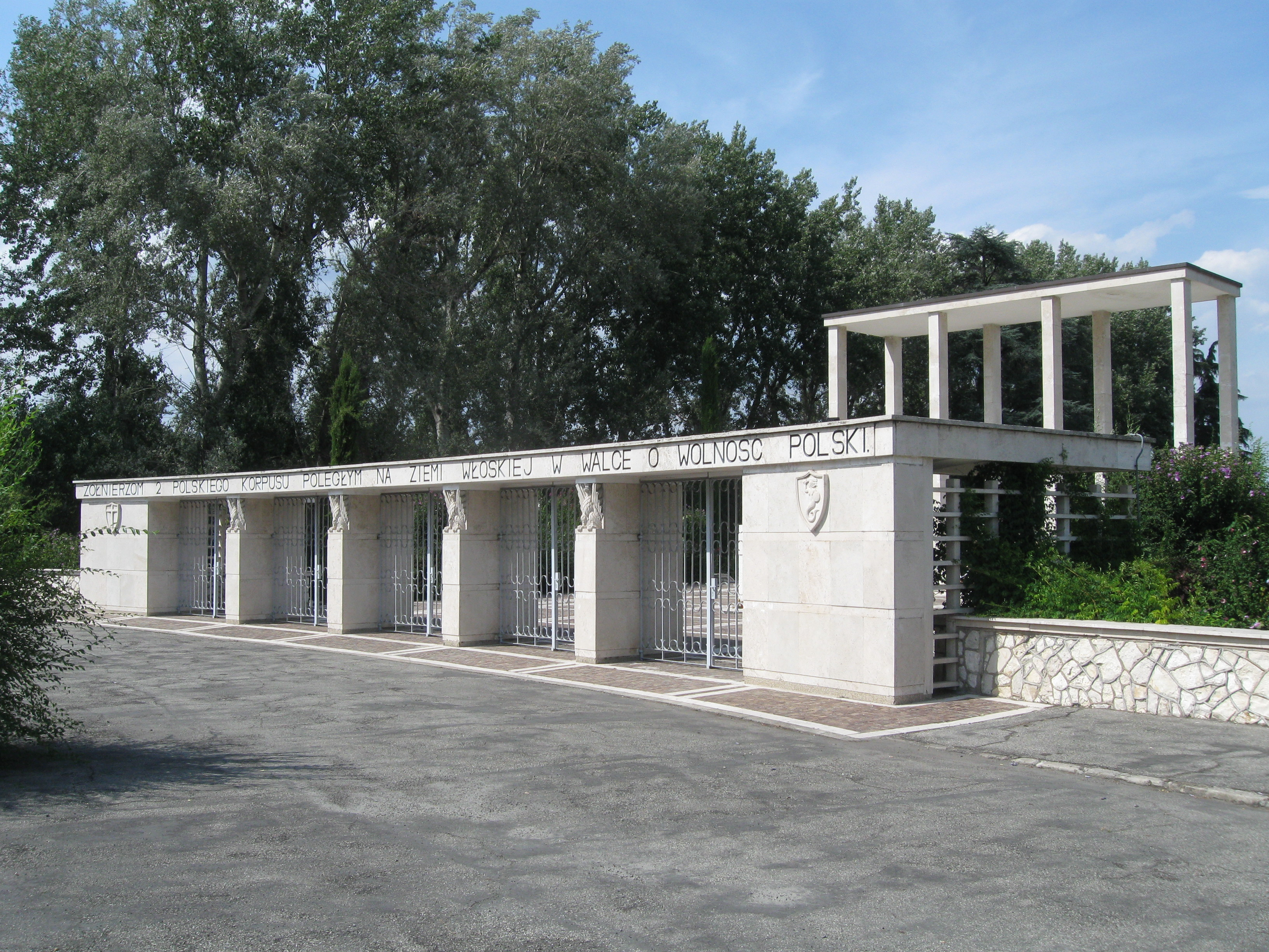 Polski Cmentarz Wojenny w Bolonii